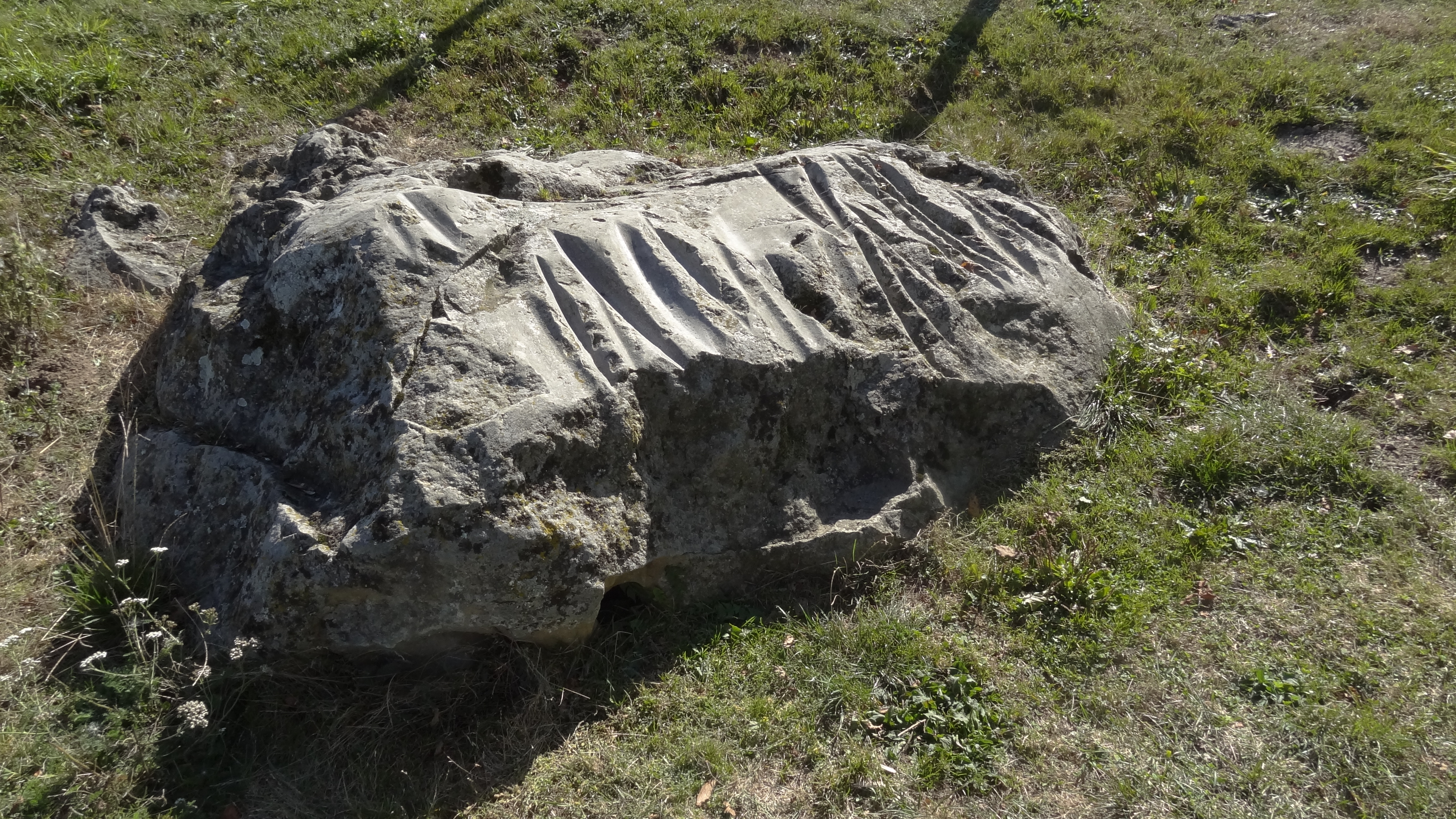 La Pierre Cochée (Classé) .